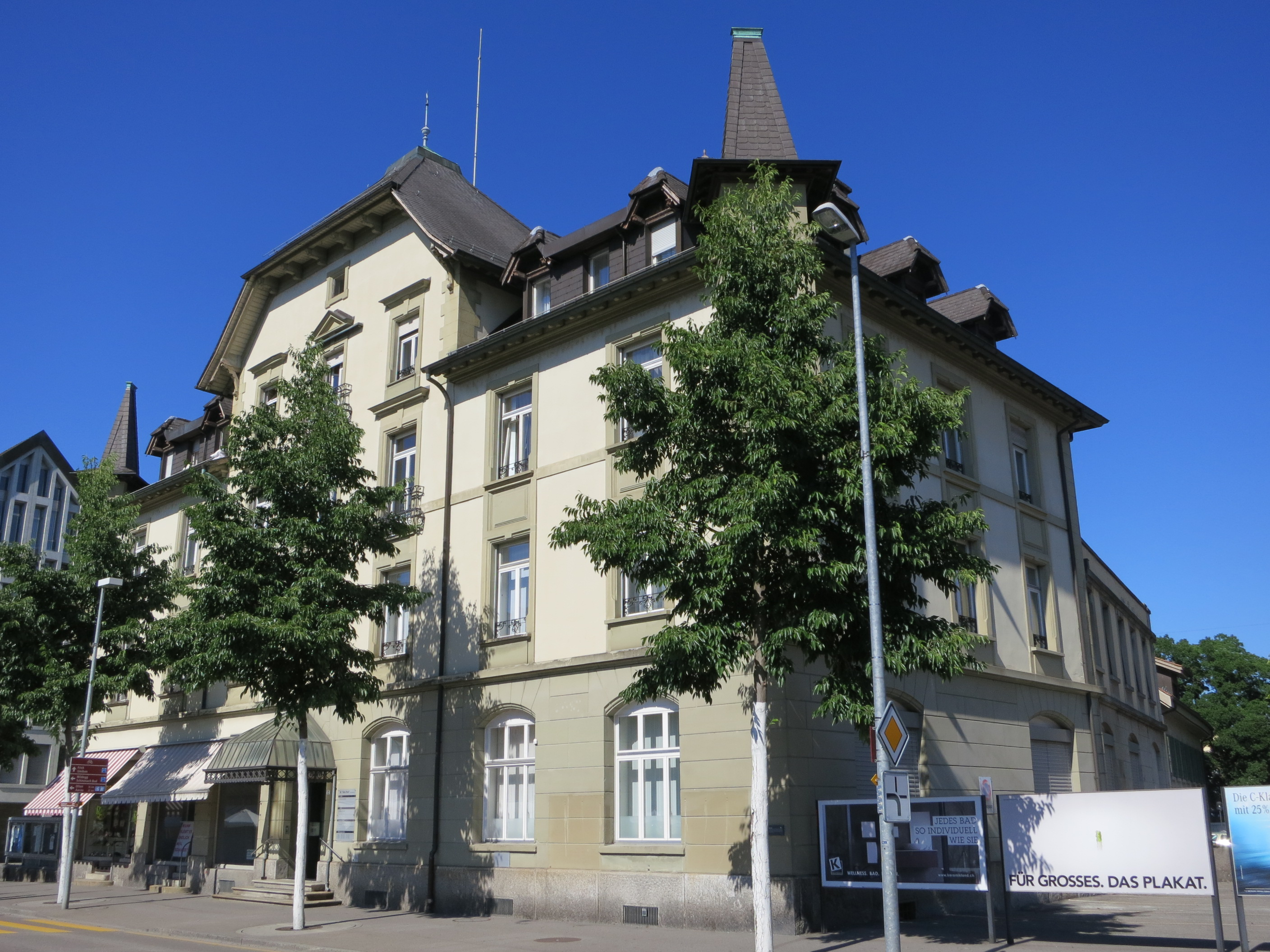 Alte Post, Brugg AG, Schweiz